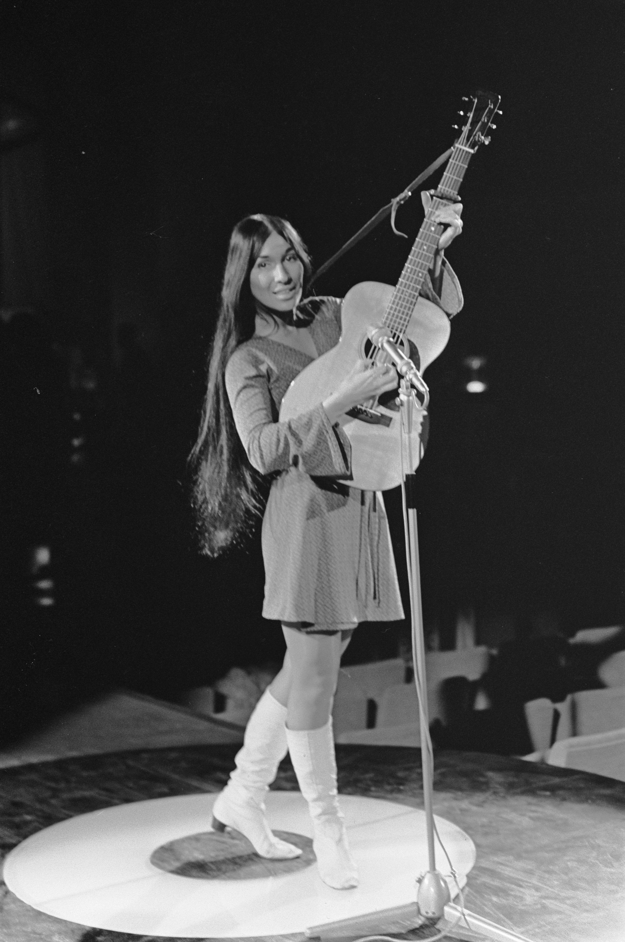 Collectie / Archief : Fotocollectie Anefo Reportage / Serie : Grand Gala du Disque 1968 Beschrijving : Grand Gala du Disque in RAI. Canadese zangeres Buffy Sainte-Marie Datum : 6 maart 1968 Locatie : Amsterdam Trefwoorden : zangers Persoonsnaam : Sainte-Marie, Buffy Instellingsnaam : RAI Fotograaf : Nijs, Jac. de / Anefo Auteursrechthebbende : Nationaal Archief Materiaalsoort : Negatief (zwart/wit) Nummer archiefinventaris : bekijk toegang 2.24.01.05 Bestanddeelnummer : 921-1410